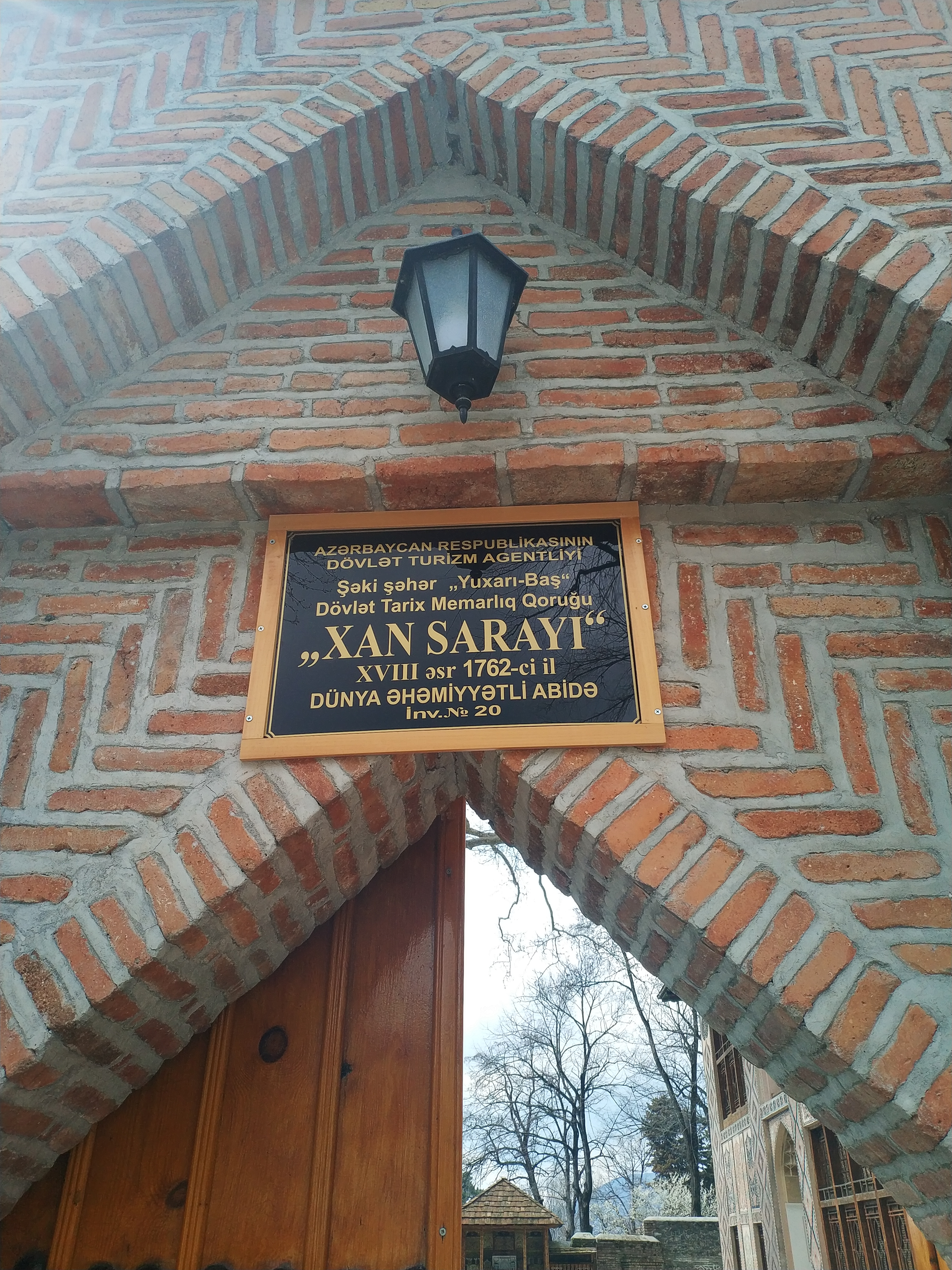 قصر الملوك في شاكي